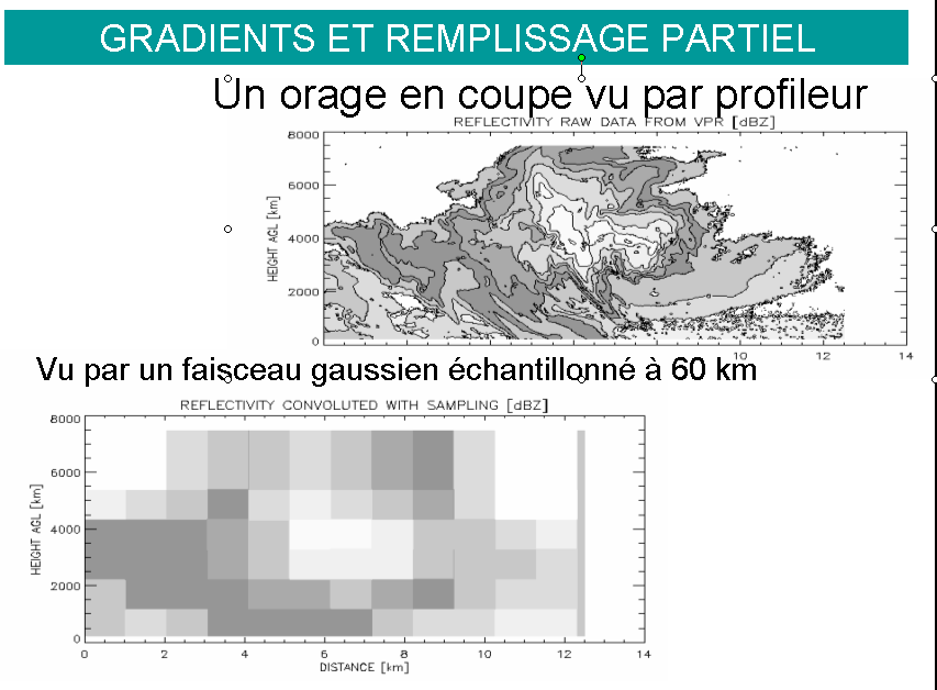 Effet de la résolution sur les données reçues par un radar. En haut, nous avons des données à très haute résolution provenant d'un profileur de vents alors qu'en bas nous avons les mêmes données pour un radar météorologique classique.